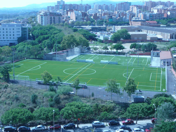 Instalaciones del F.C.Can Buxeres en el barrio de Can Serra en L'Hospitalet de Ll.